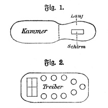 Zeichnungen zum Artikel „Hauptjagen“ - Eingestelltes Jagen